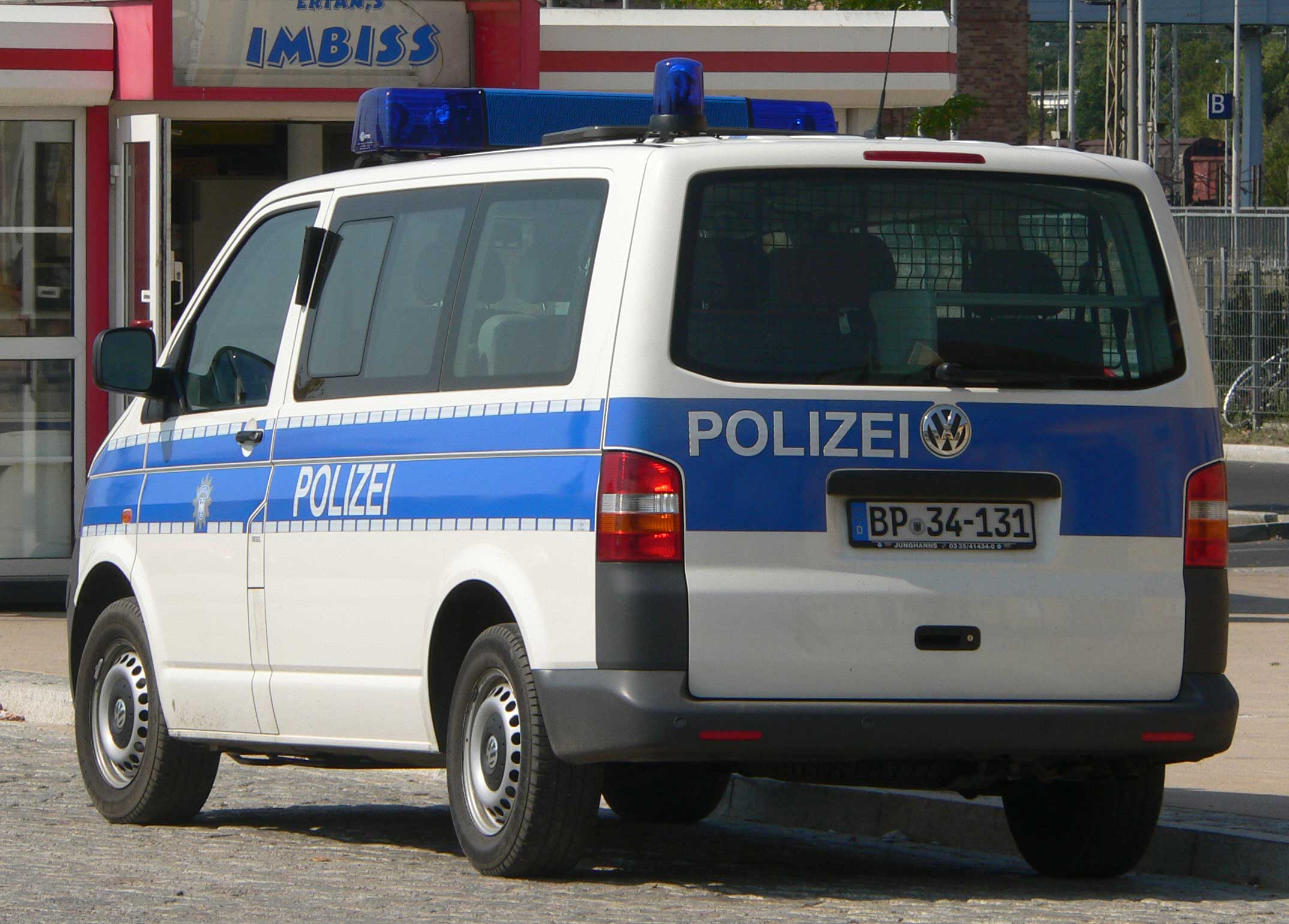 BP-Kennzeichen